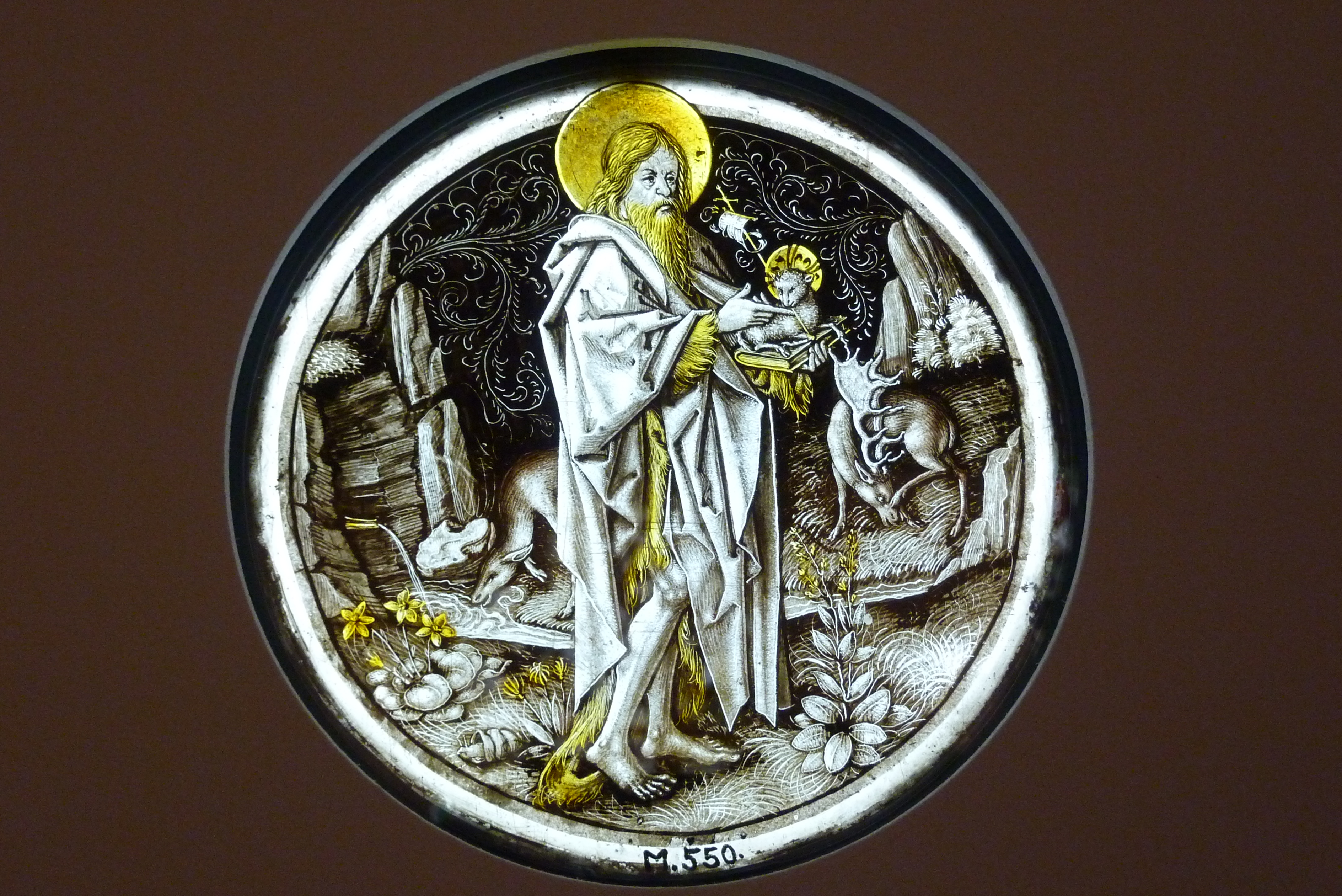 Bleiglasfenster im Museum Schnütgen in Köln, Darstellung: Johannes der Täufer, Mittelrhein um 1480/85, Inventar-Nr.: M 550, siehe Brigitte Lymant: Die Glasmalereien des Schnütgen-Museums. Schnütgen-Museum, Köln 1983